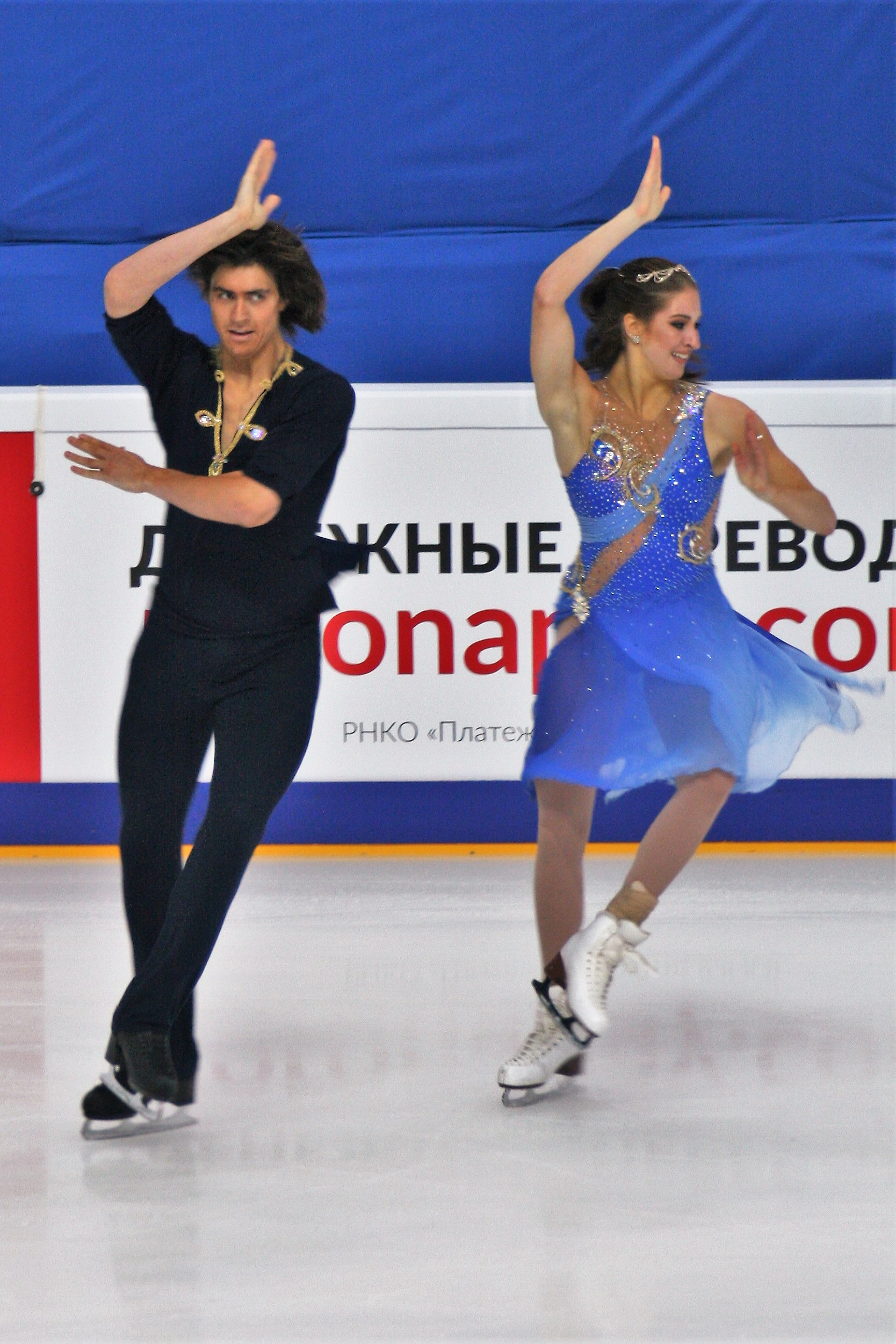 Эллиана Погребински / Алекс Бенуа (США) на Rostelecom Cup 2016